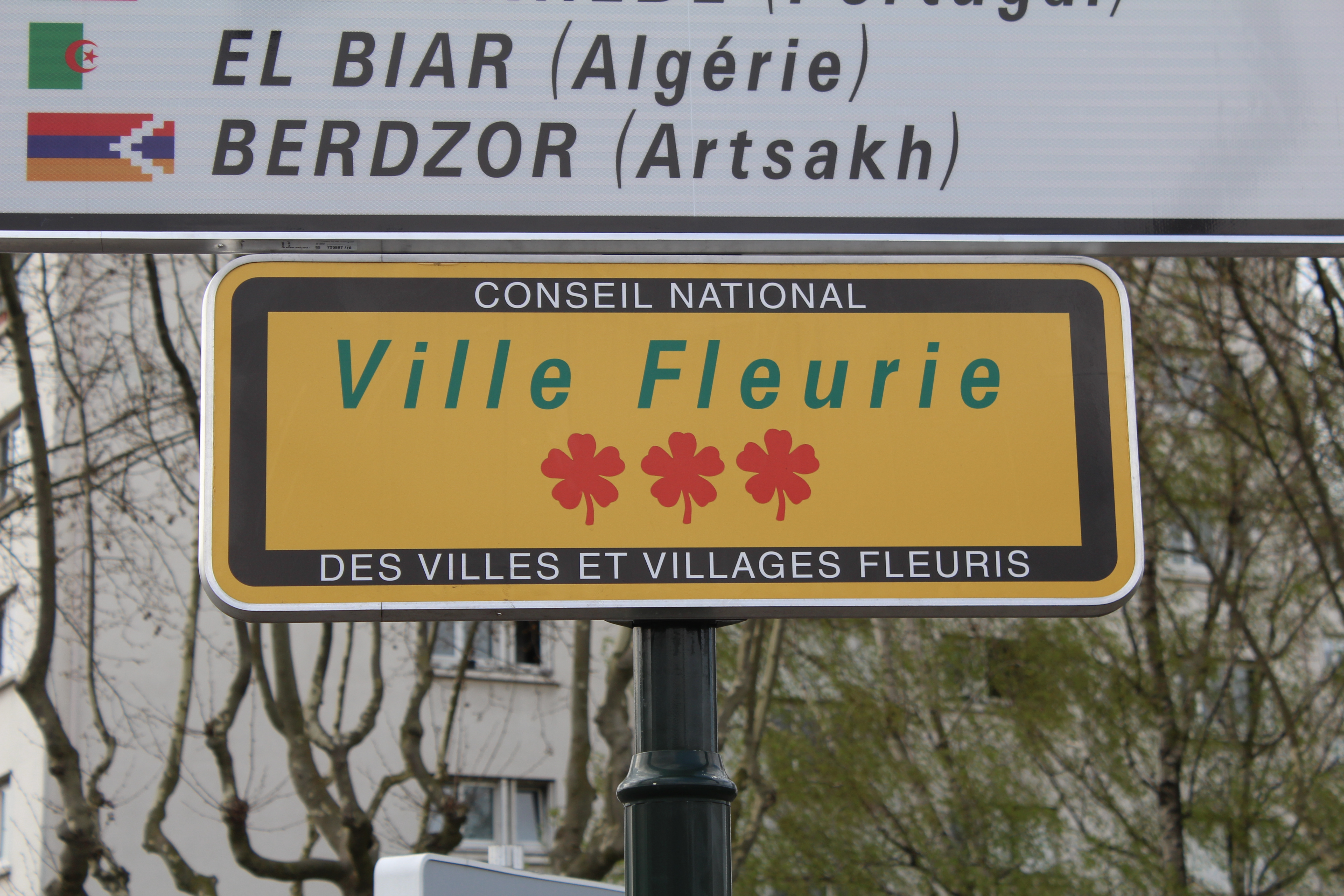 Panneau Ville fleurie avec 3 fleurs, Alfortville.